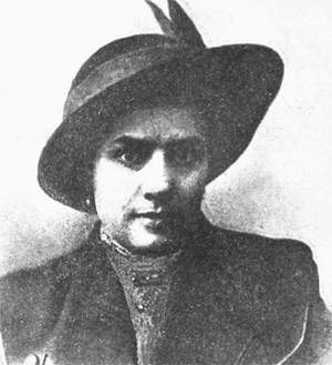 Вера Чеберяк Vera Cheberyak